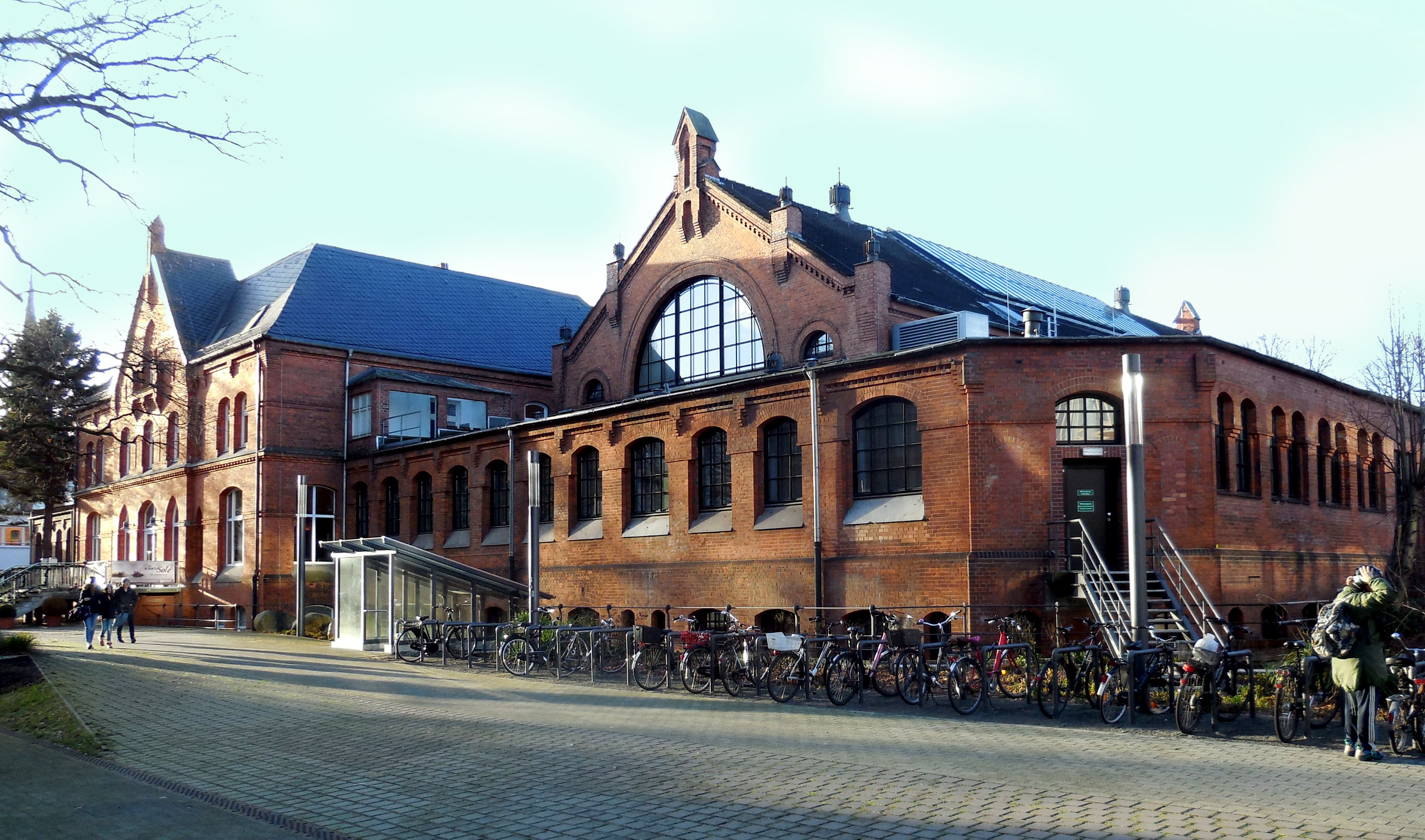 Kaifu-Bad Hamburg GEbäude mit Seitenfluegel